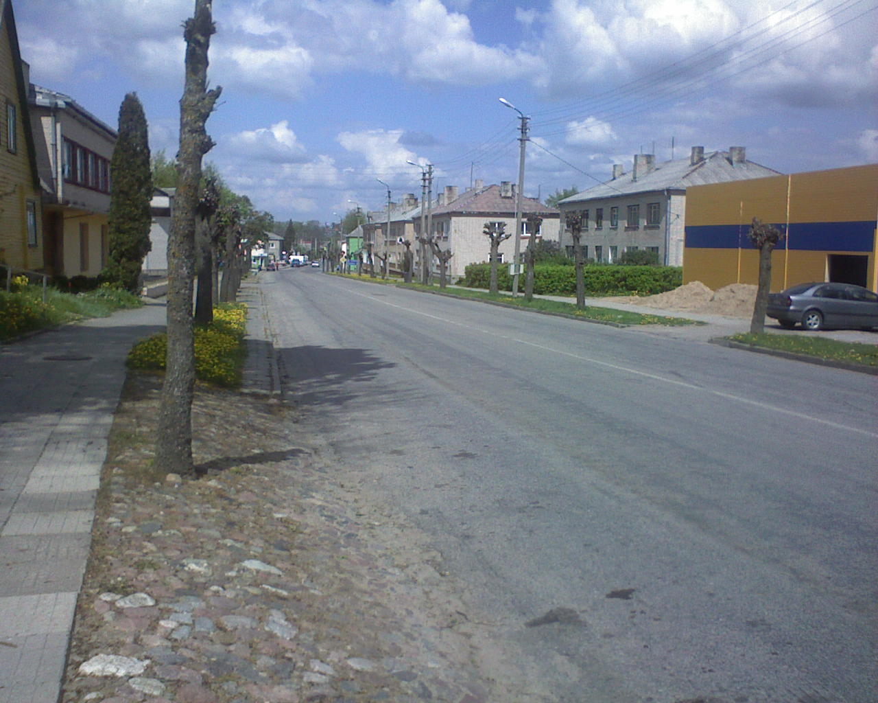 Užventis